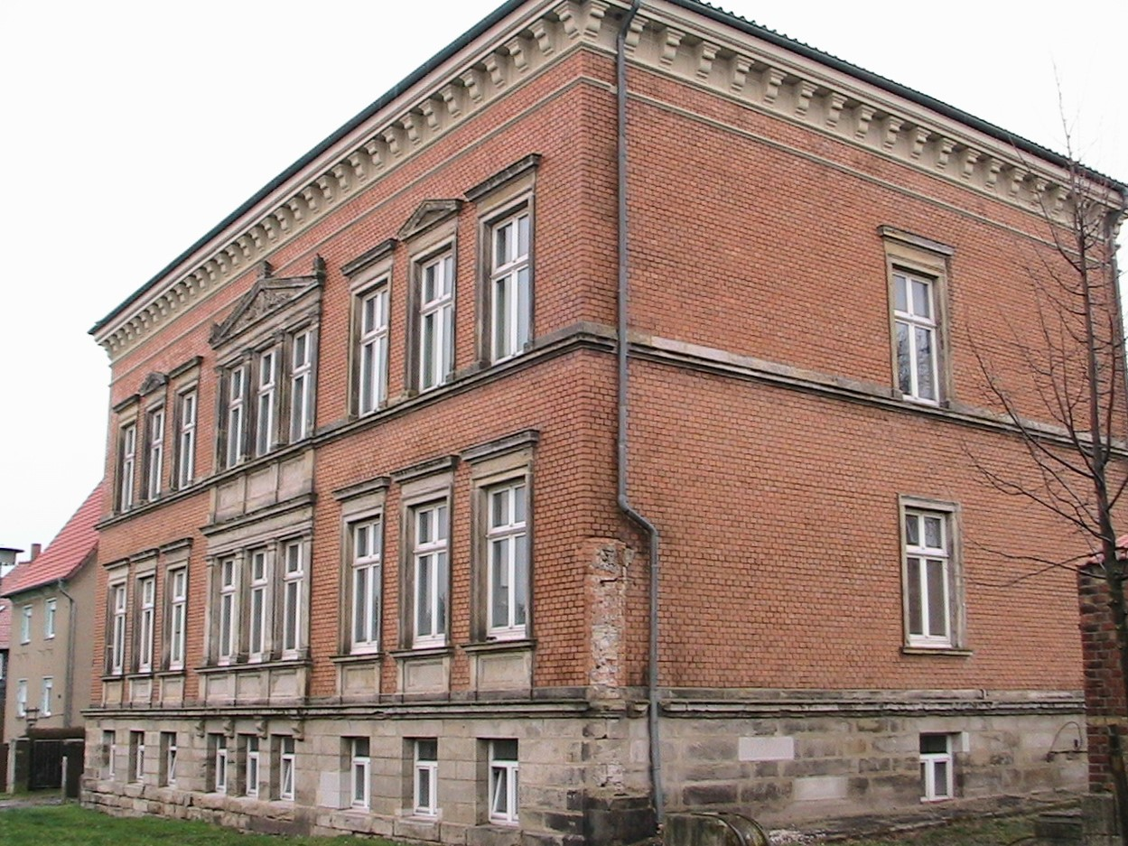 Bauernvilla in Pabstorf (Sachsen-Anhalt)